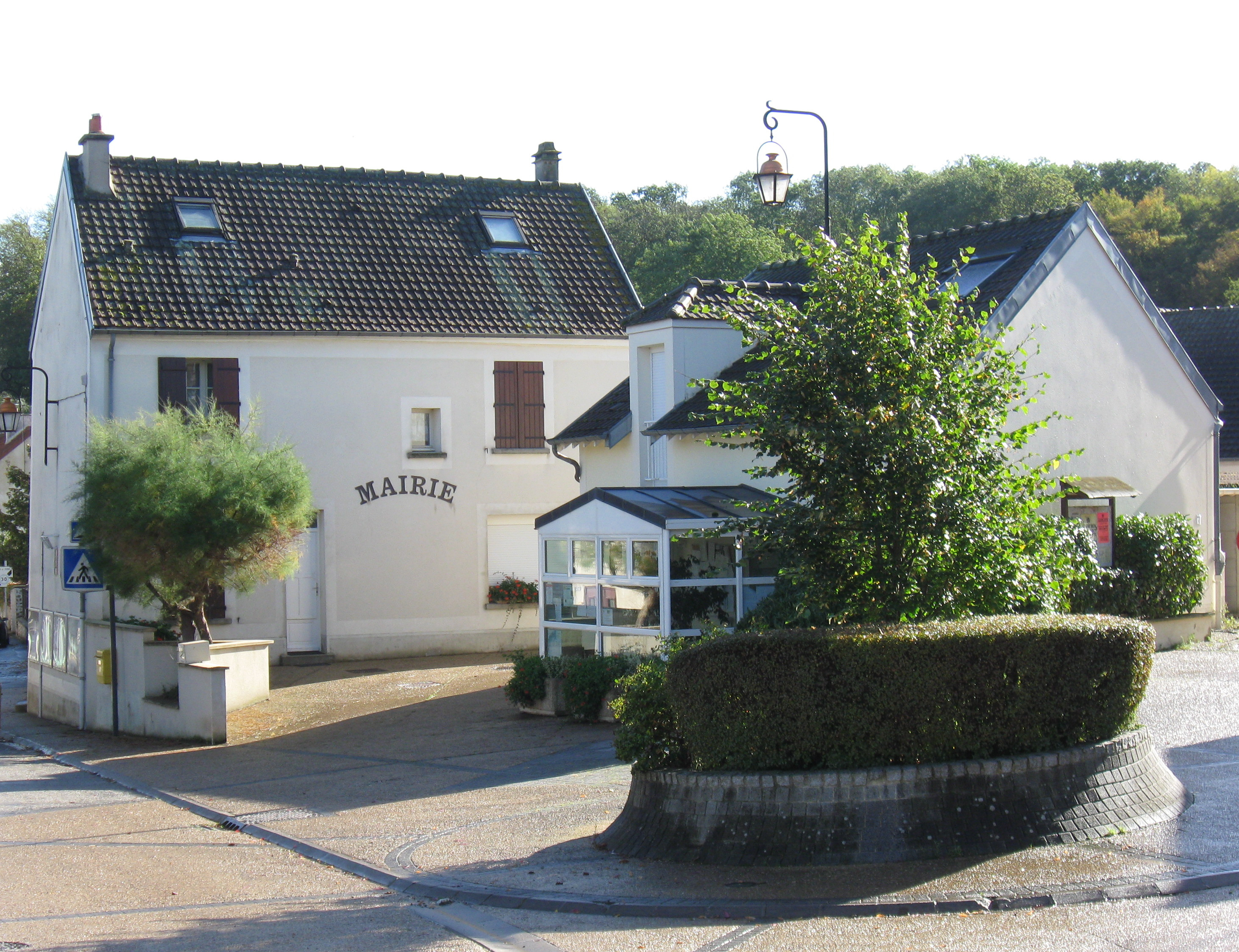 Mairie de Sept-Sorts (département de la Seine-et-Marne, région Île-de-France).